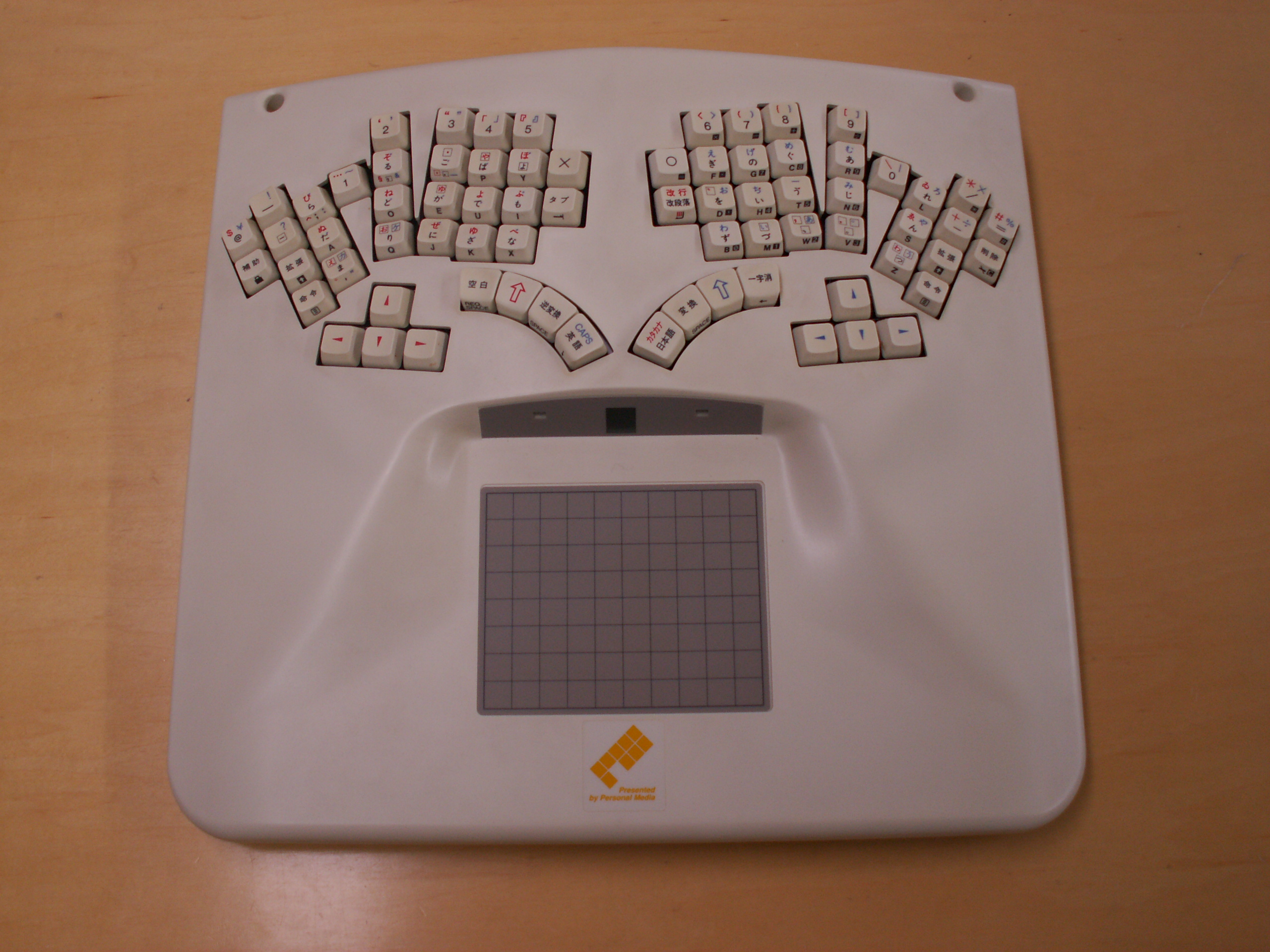 TRONキーボード パーソナルメディア(株) TK1 上面